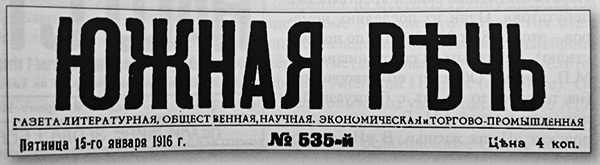 Газета Южная Речь, издатель Л.Л. Либерман ( сайт vmelitopole.ru)